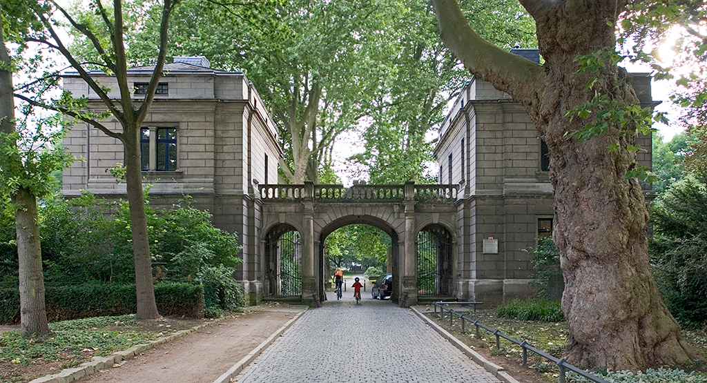 Torhäuser des Von-Alten-Gartens in Hannover-Linden von 1911 (aufgenommen im Juli 2005)